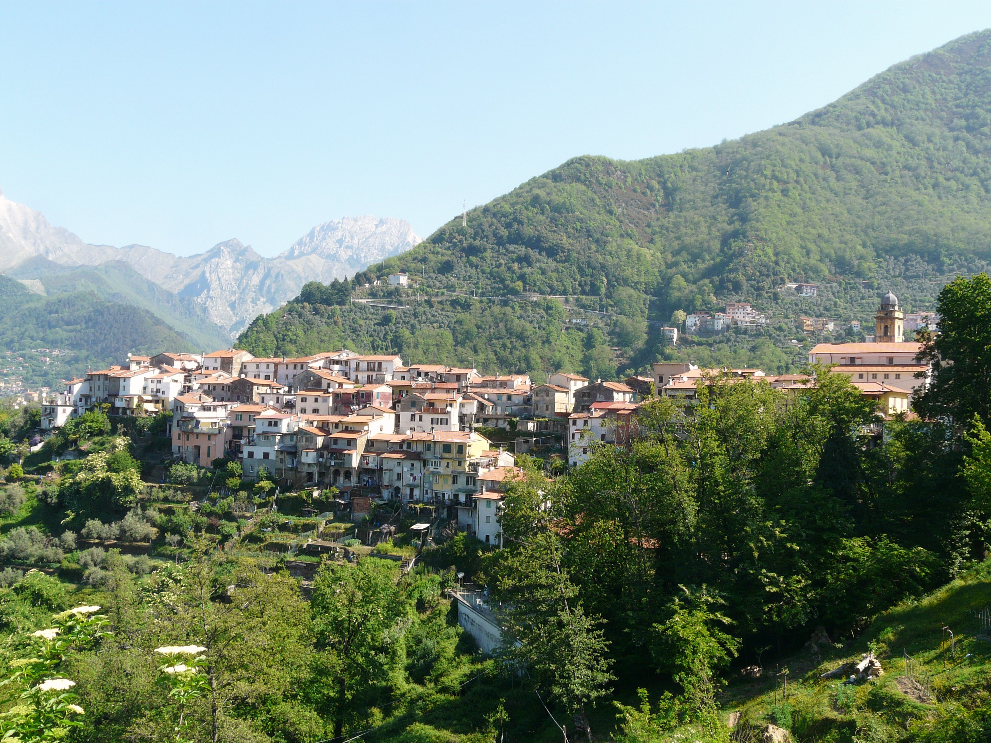 Panorama di Altagnana, Massa, Toscana, Italia